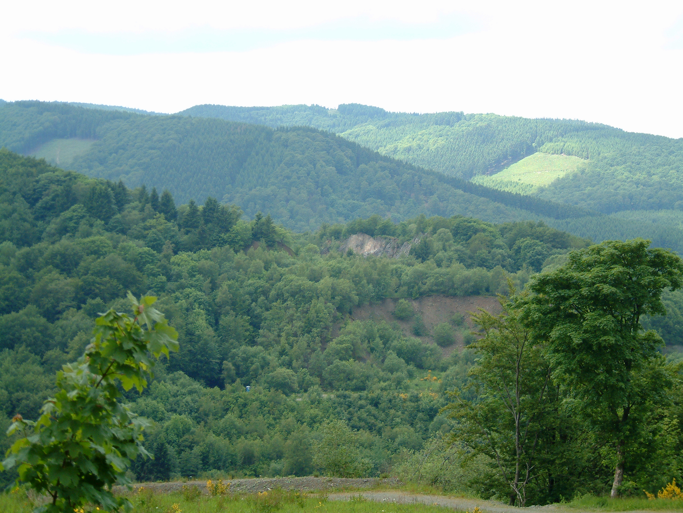 Meisterstein vom Iberg aufgenommen.